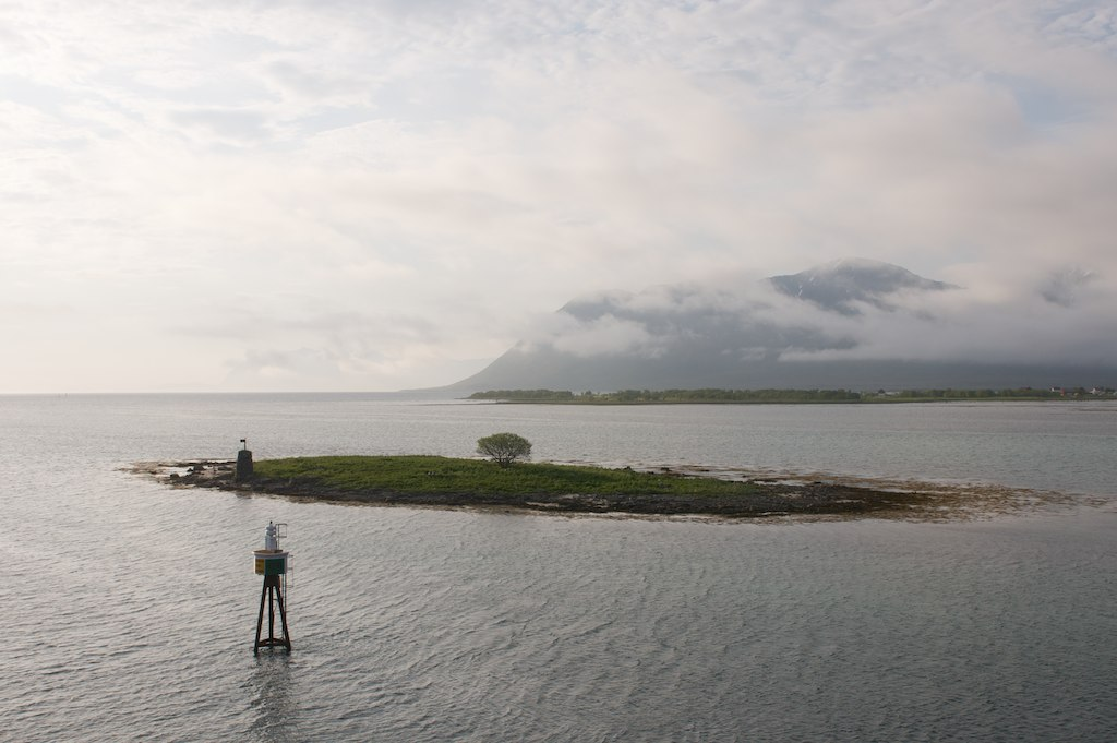 Risøyrenna er en utgravd del av Risøysundet, offisielt åpnet 25. juni 1922.